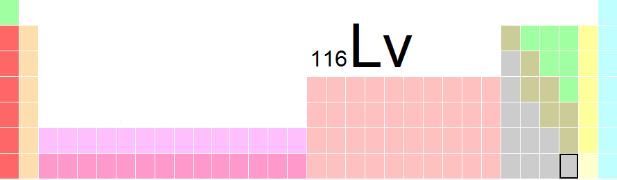 Localização do elemento Livermório (116) na tabela periódica